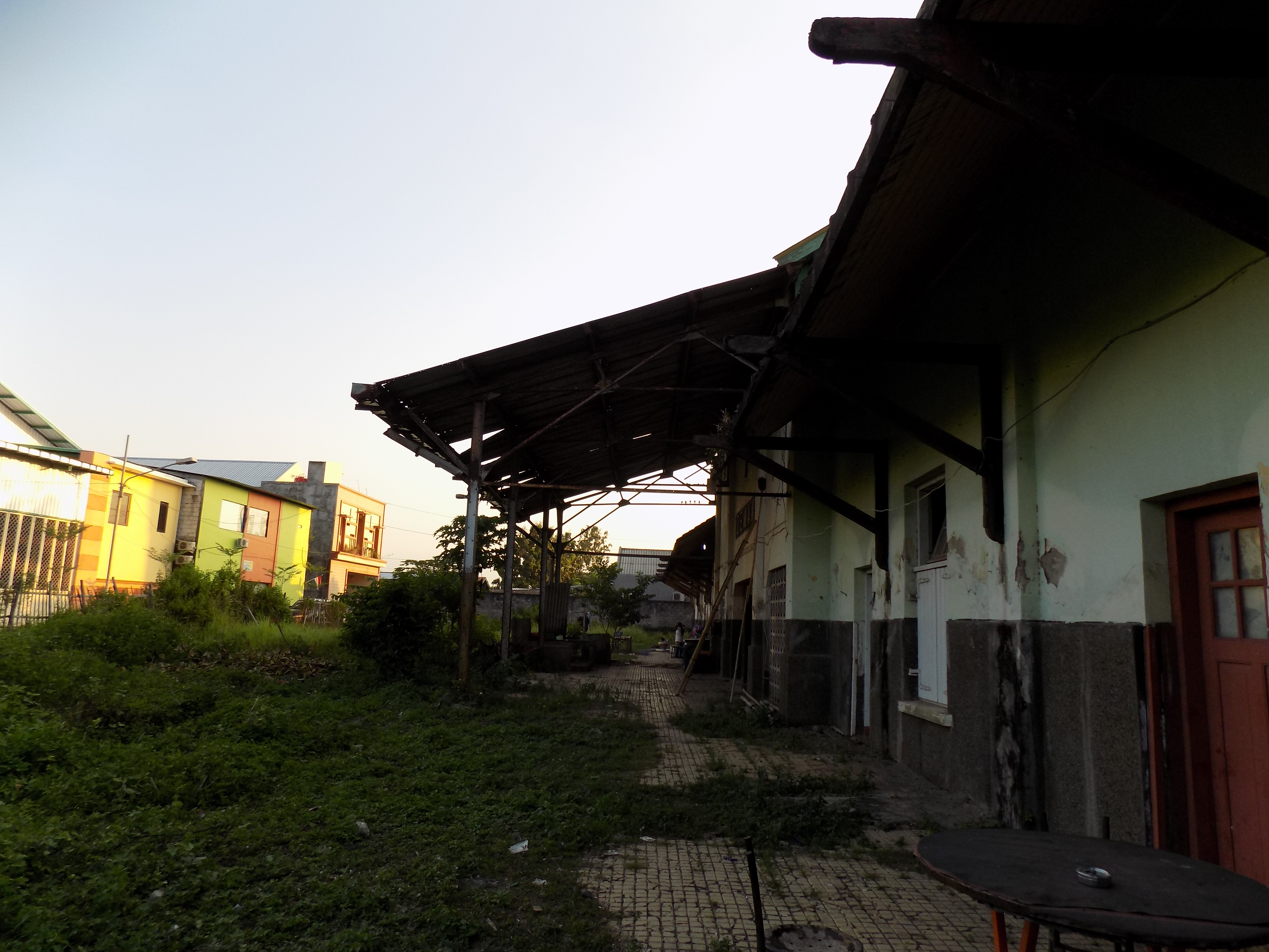 Stasiun Demak